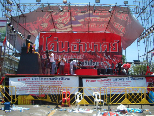 The red shirt stage from which their leaders called for their revolution ... (Bangkok, Thailand); 14 April 2009